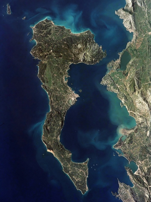 Vue satellite de l'île de Corfou Source : Wikipédia anglais[1] Siren 14 avr 2005 à 09:49 (CEST)